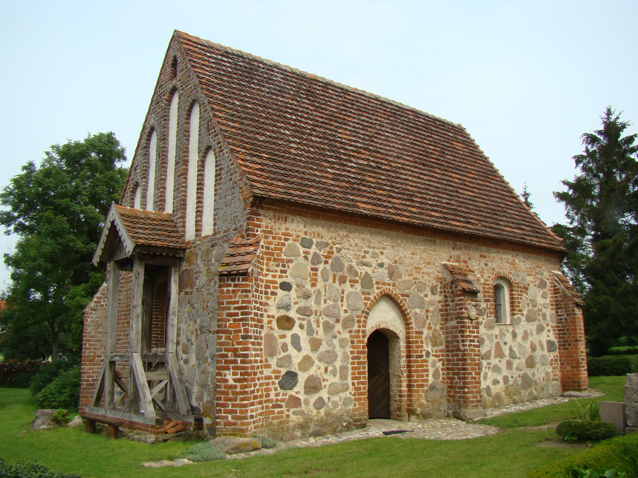 Kapelle in Gessin, Foto: Peter Schmelzle